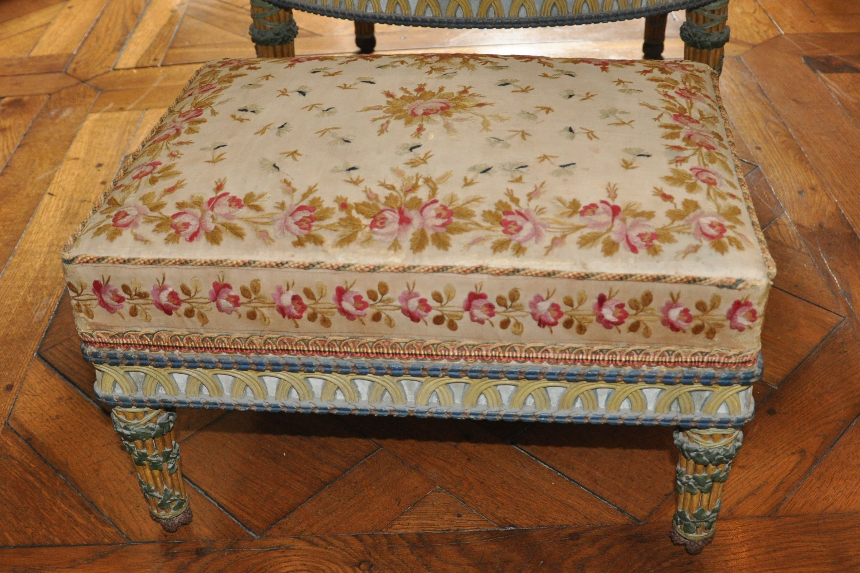 Georges Jacob (Français, 1730-1814): tabouret repose-pied d'époque appartenant au mobilier aux épis (1787) . Chambre de Marie-Antoinette, Petit Trianon, Versailles, France.